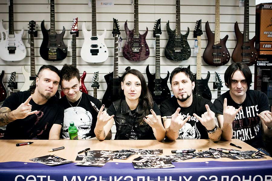 Автограф-сессия группы Louna в Санкт-Петербурге 09.03.2012г.